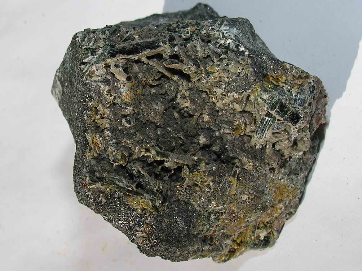 Hedemberguita